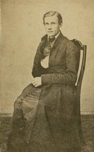 Antanas Mackevičius